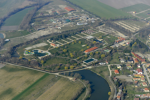 A Termál kemping (Lipót) légi fotón